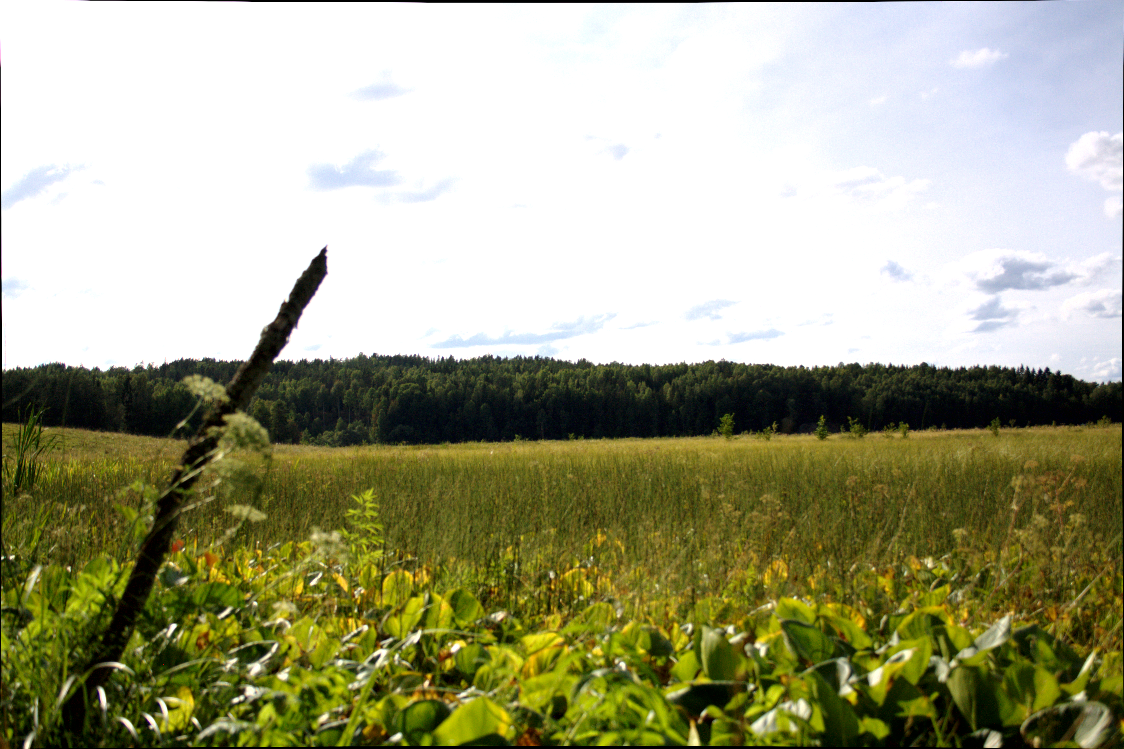 Foto från naturreservatet Näset i Lindesbergs kommun.